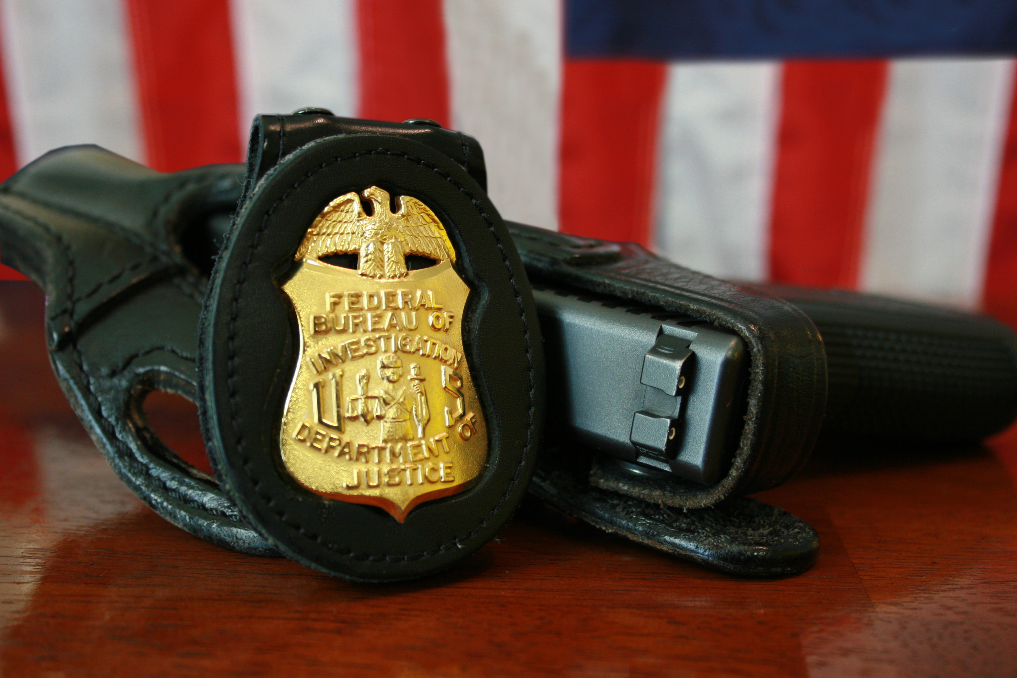 FBI Badge & gun.